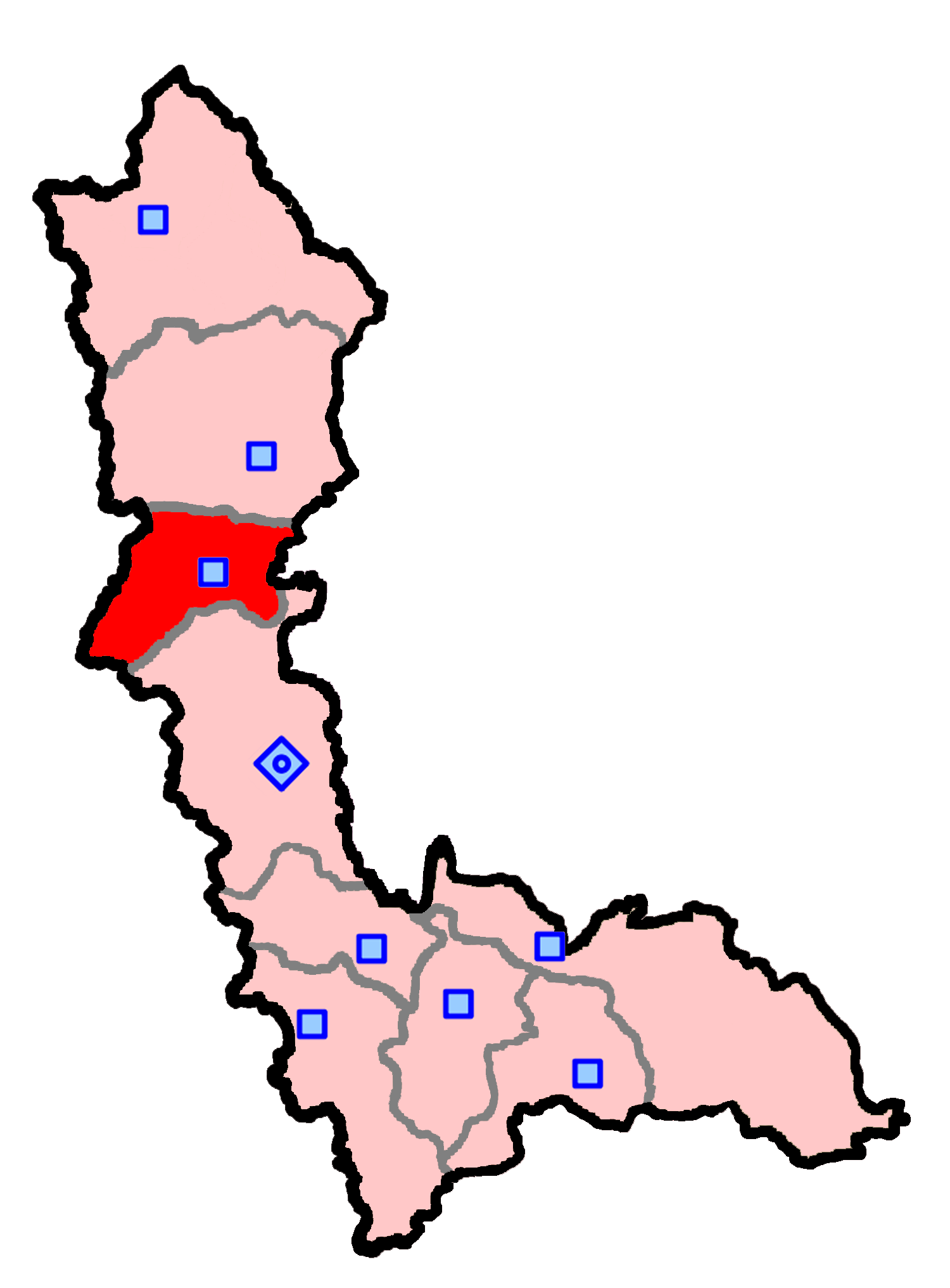 حوزهٔ انتخاباتی سلماس برای انتخابات مجلس شورای اسلامی